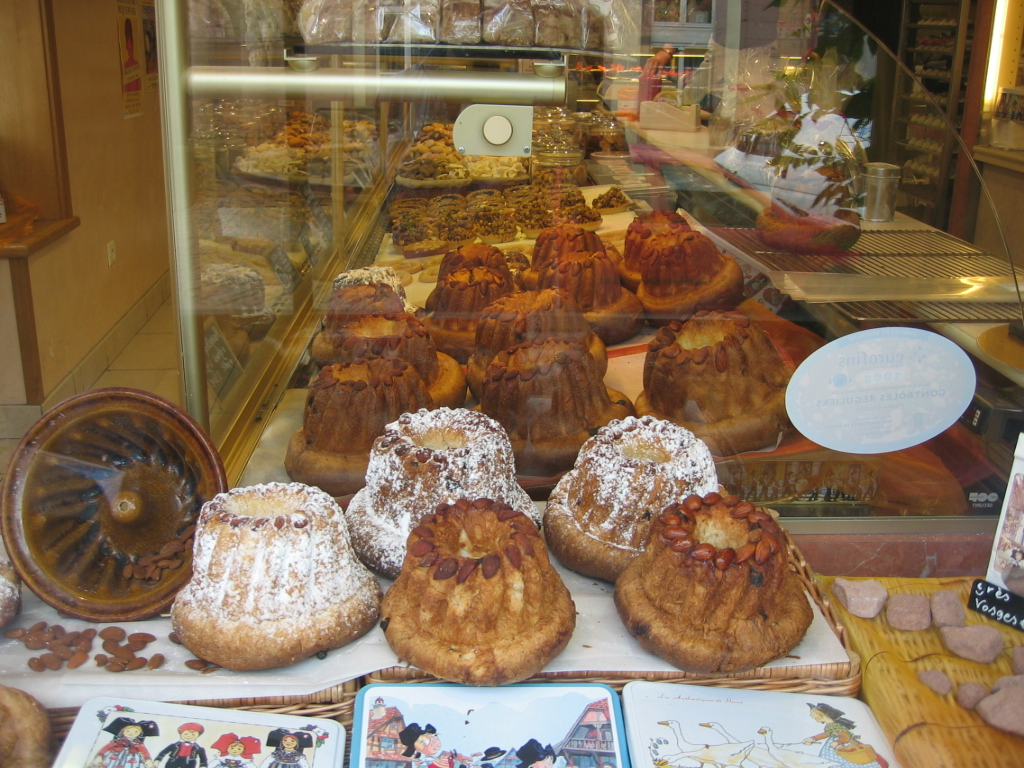 Riquewihr - Village de caractère - Alsace - France